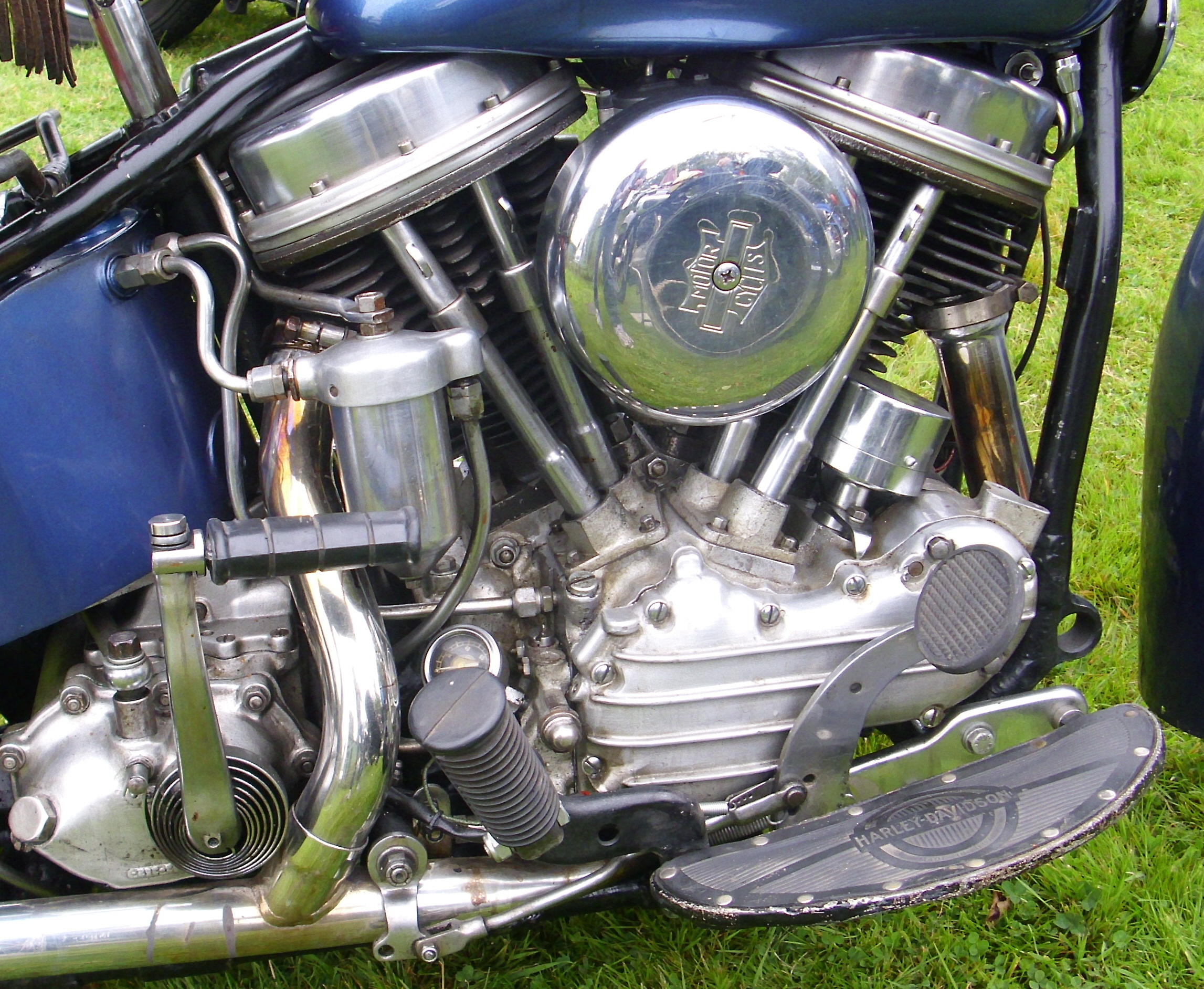 Motor einer Harley Davidson FL Hydra-Glide beim Oldtimertreffen auf dem Gelände des Speichenmuseums in Klein Offenseth-Sparrieshoop.